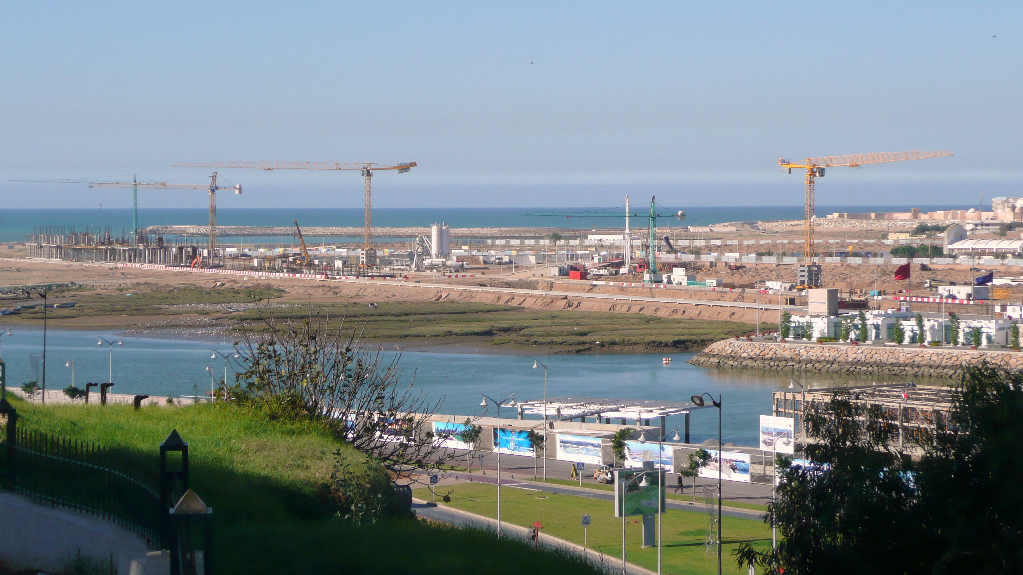 Le futur nouveau quartier d'affaires et de loisirs de Bab Al Bahr en cours de construction à l'embouchure de l'oued Bou Regreg (Rabat, Maroc)